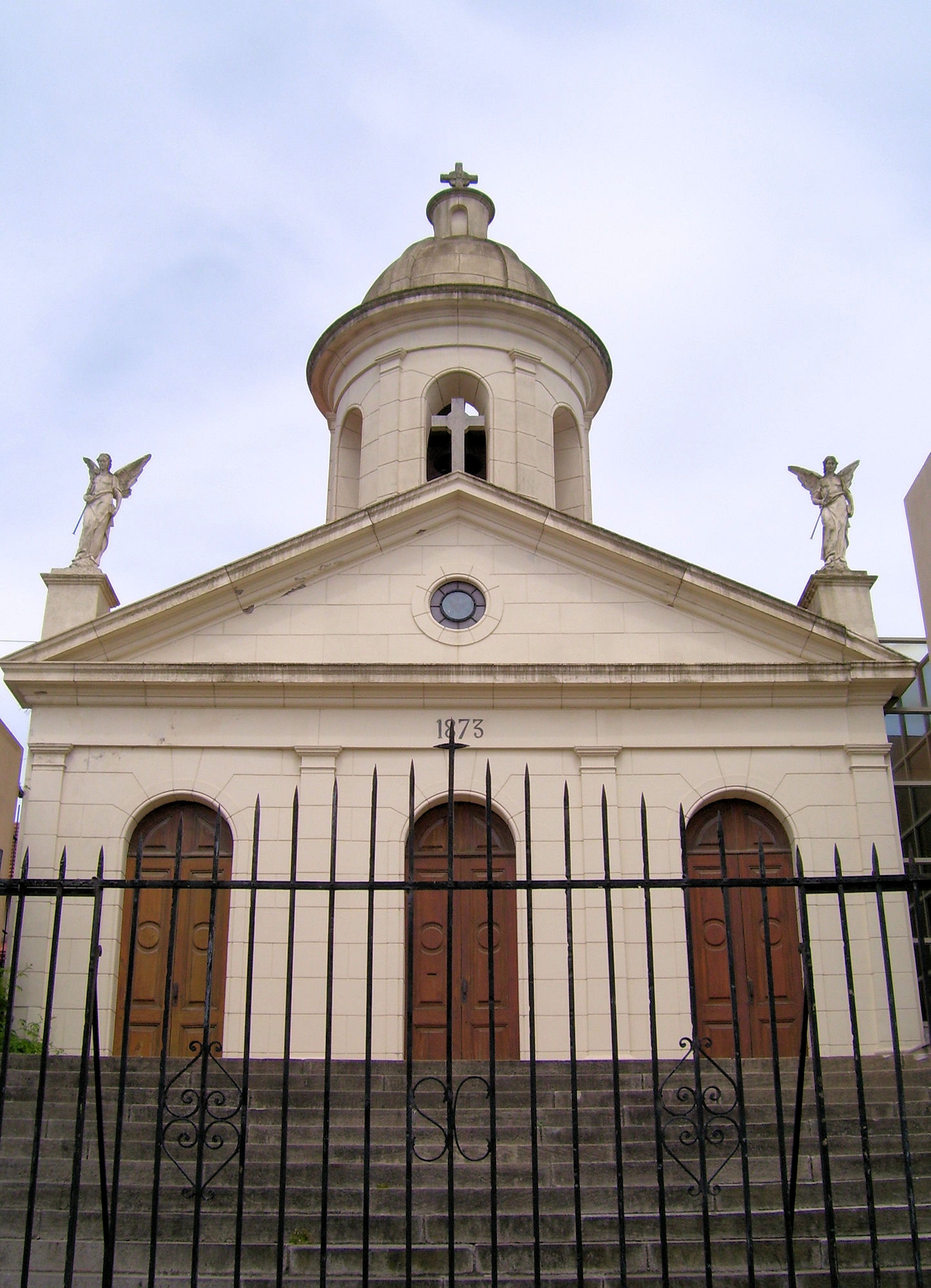 Capilla de Santa Cecilia, en la cima de la colina del mismo nombre. La capilla, construida en 1873 es el hito fundacional de la ciudad de Mar del Plata